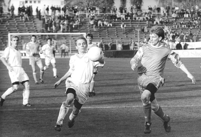 ADN-Bernd Settnik-10.11.90-Berlin: Fußball-Oberliga- FC Berlin - HFC Chemie 0:0-Duell im Friedrich-Ludwig-Jahn-Stadion: HFC-Spieler Dirk Wüllbier (r.) und der Berliner Dirk Rehbein (2.v.r.) im Kampf um den Ball.